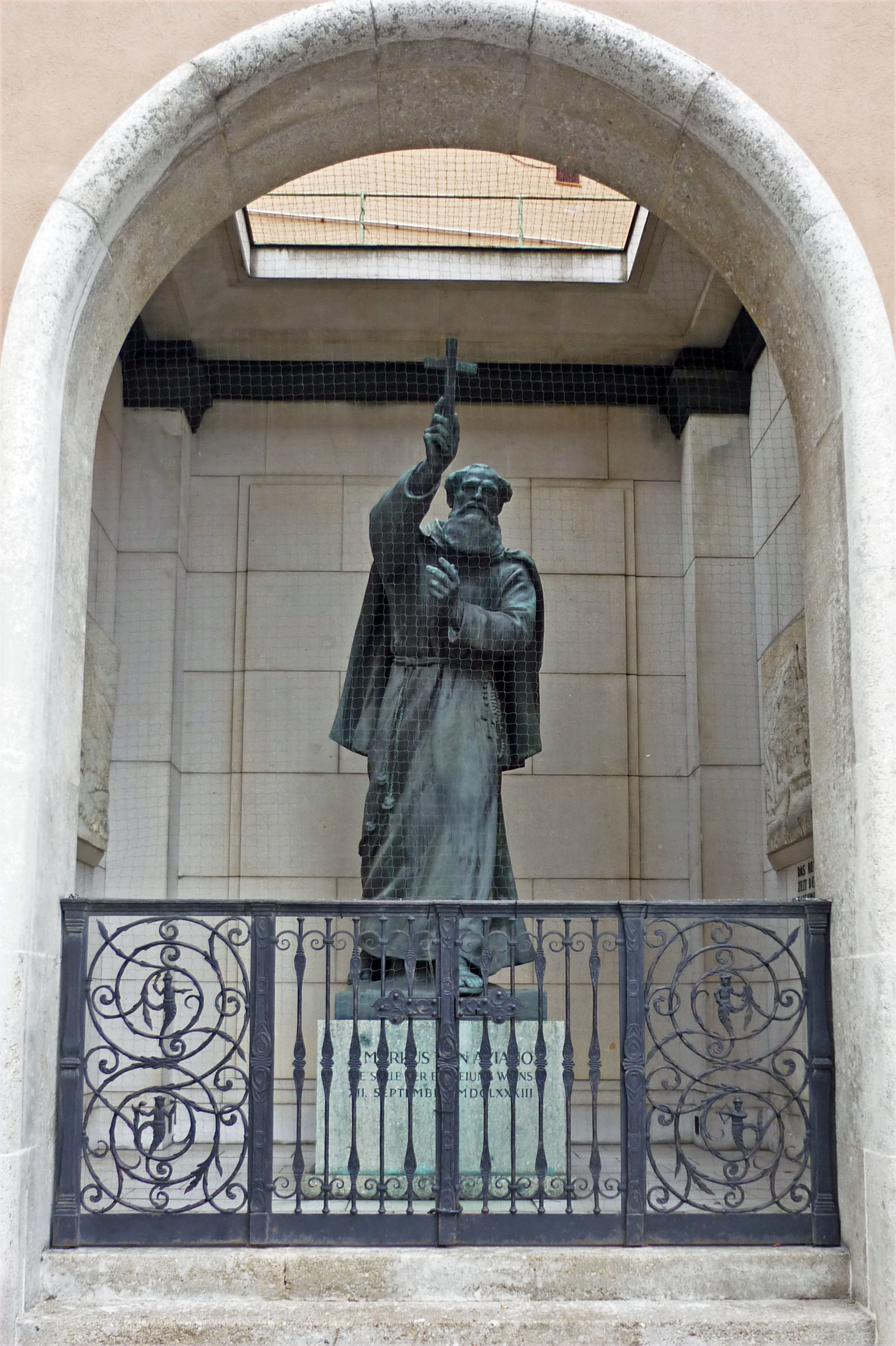 Markus von Aviano-Denkmal an der Kapuzinerkirche Wien, Neuer Markt (1683, der seelische Retter Wiens)